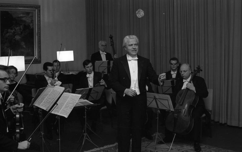 Konzert u. Empf. in der La. Vertr. Baden-Württemberg (Stuttg. Kommerorchester unter Prof. Mündinger)